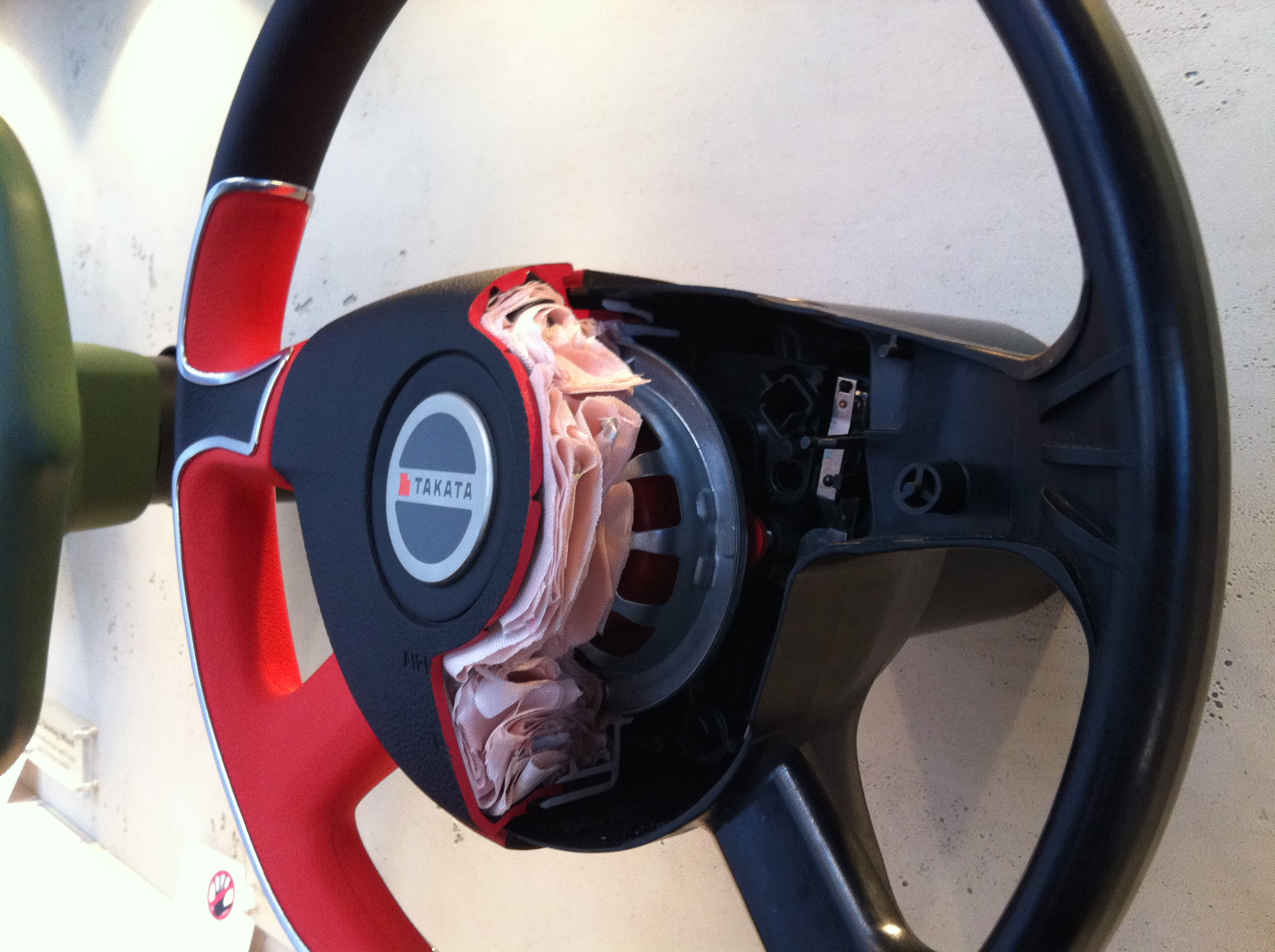 in der Lenkradnabe gefalteter Airbag